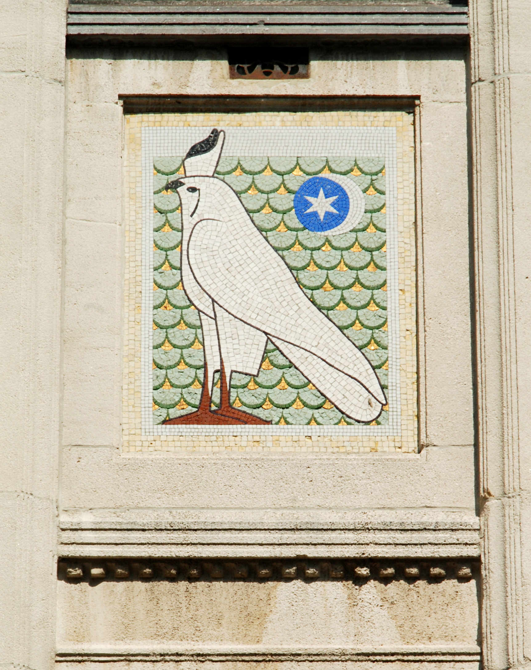 Belgique - Bruxelles - Maison Bruno Schmidt (Art nouveau, architecte Jean-Baptiste Dewin, 1910)